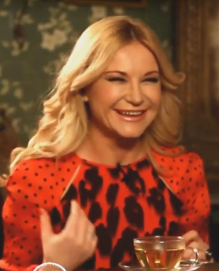 Rodica Ciorănică, invitată la emisiunea „Lumea Sandei”